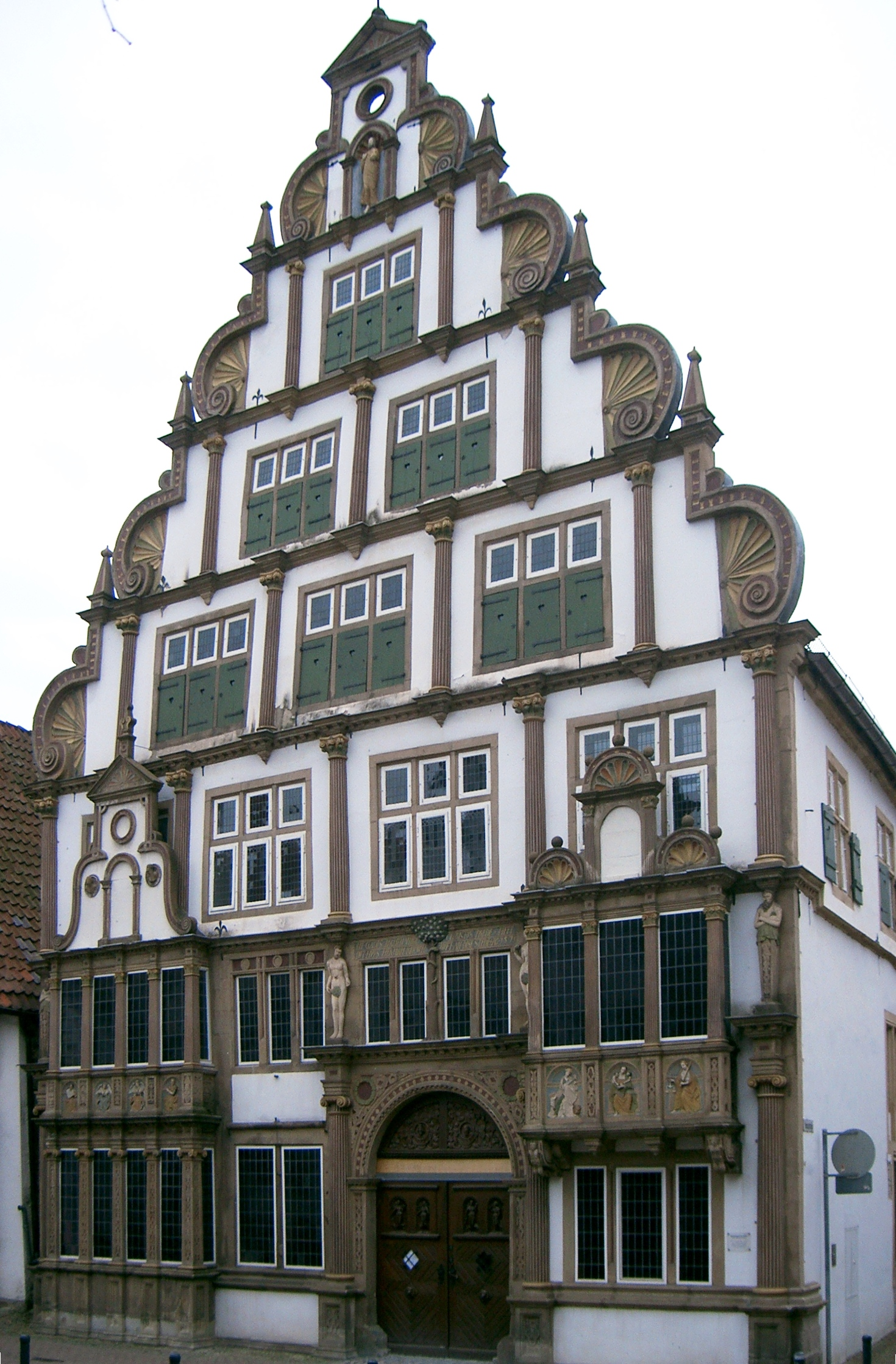 Hexenbürgermeisterhaus in Lemgo/Lippe. Fassade ab 1571. Zustand im Mai 2004.